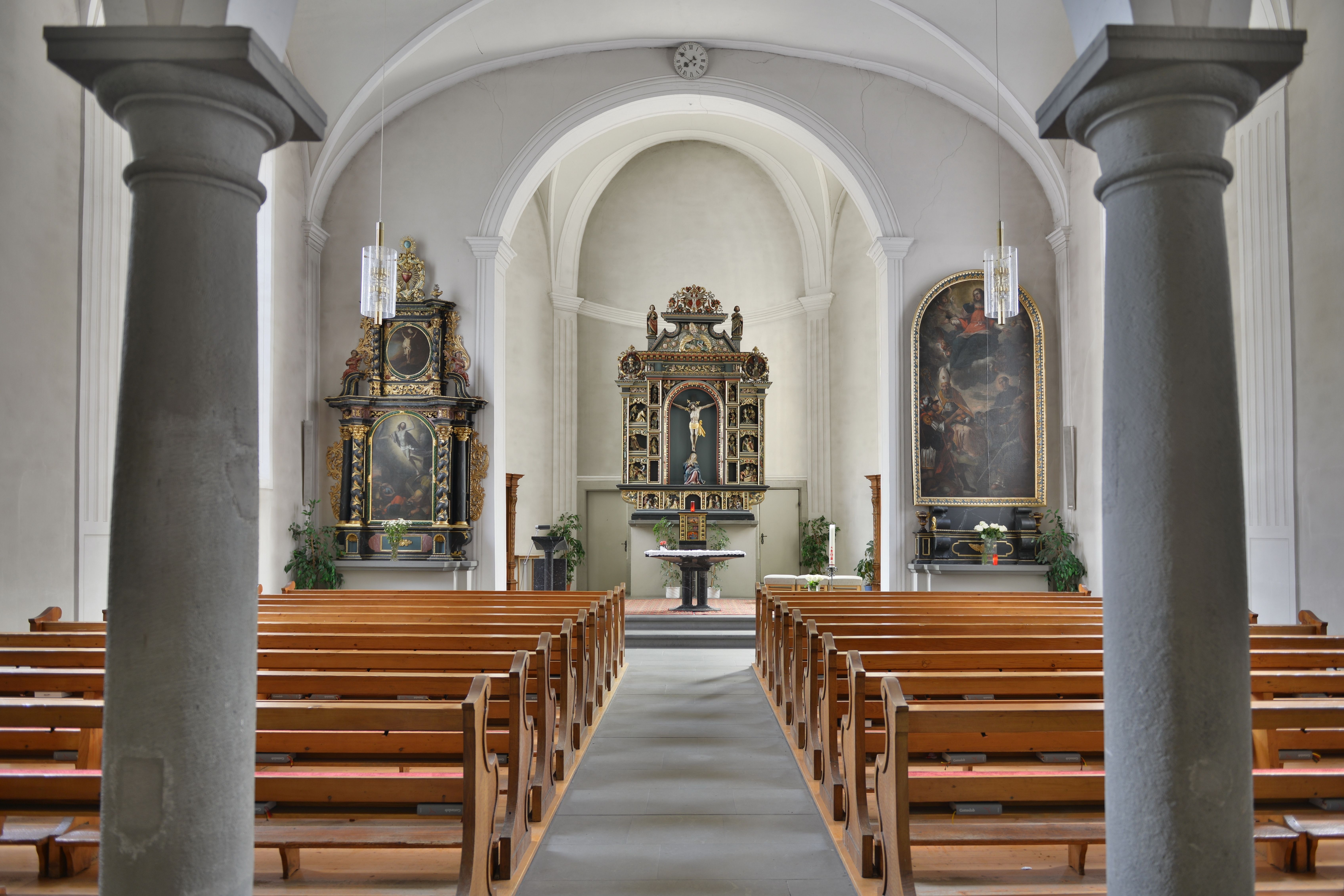 Die Seekapelle an der Rathausstraße in Bregenz wurde 1445 zum Gedenken an den Sieg über die Appenzeller (1408) errichtet und 1698/99 nach den Plänen von Christian Thumb durch Kaspar Held im Barockstil an das Bregenzer Rathaus angebaut. Die Seekapelle besitzt einen bemerkenswerten Renaissance-Hochaltar von Esaias Gruber aus dem Jahre 1615, der ursprünglich in der Schlosskapelle des Schlosses Hofen in Lochau stand.